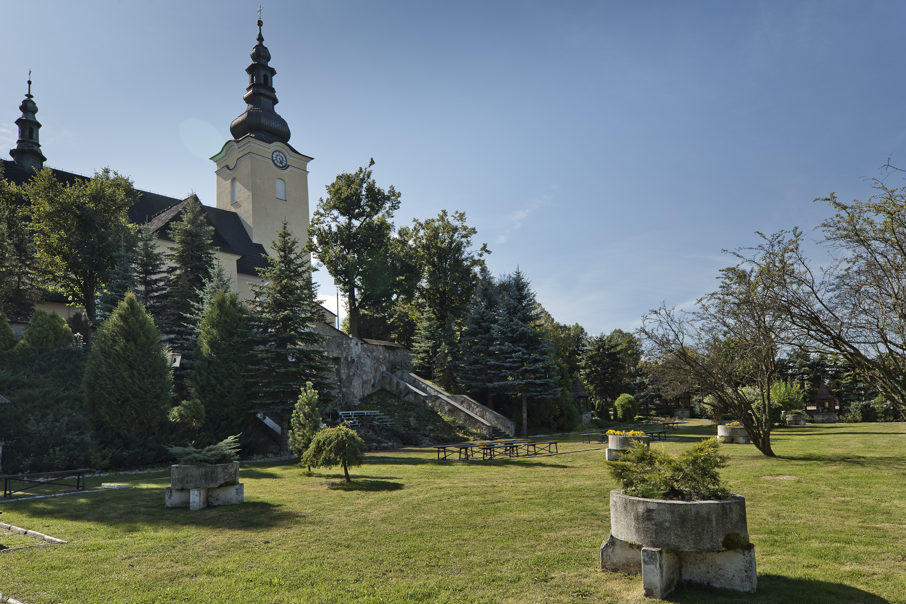 Kościół par. p.w. św. Katarzyny, Nowy Targ - ogród przy kościele